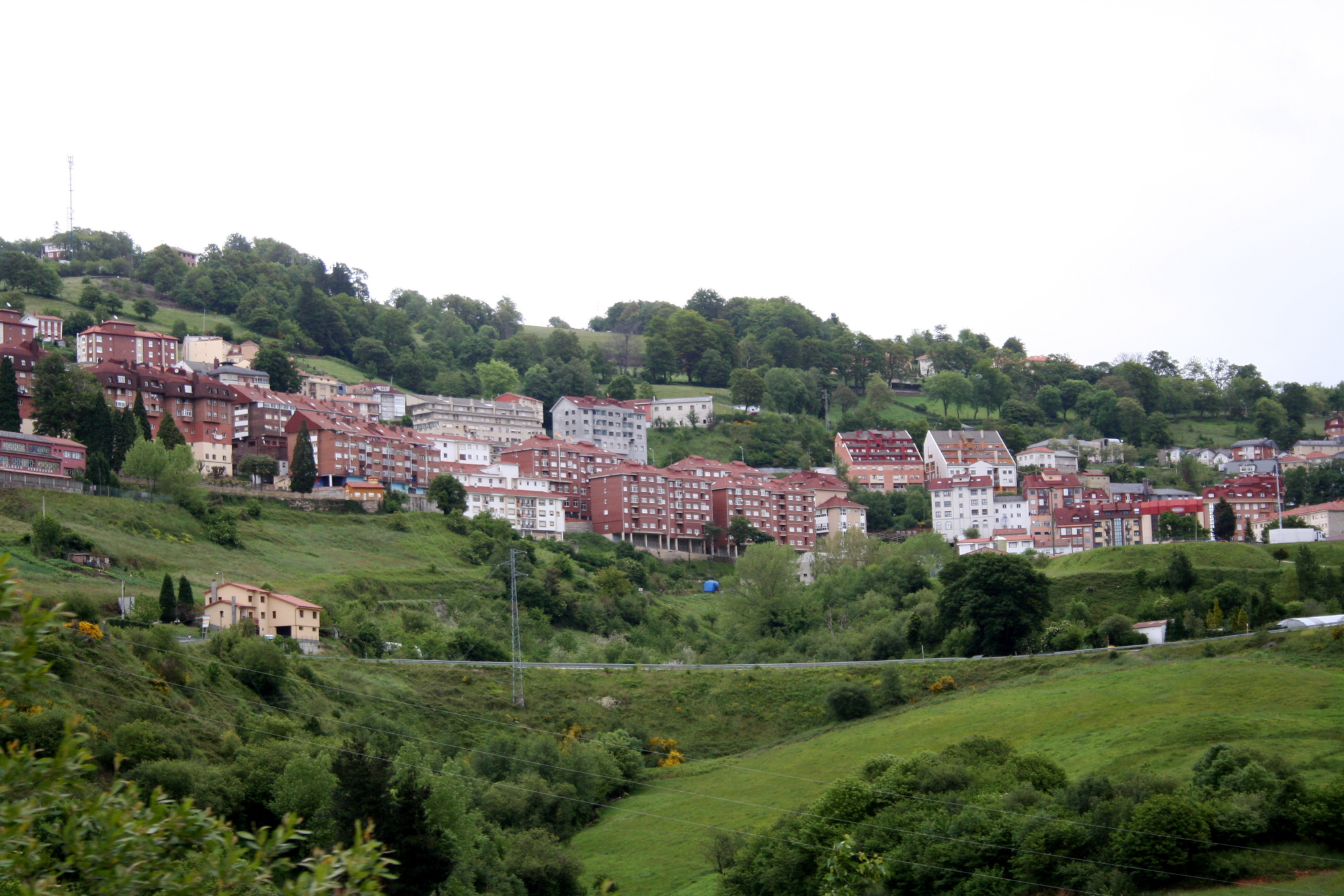 Tineo